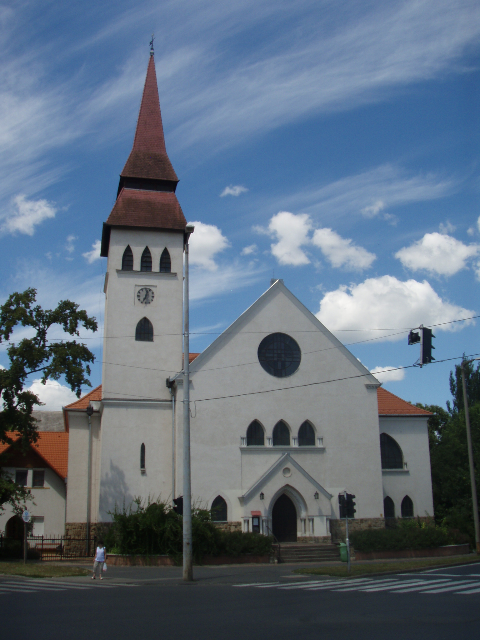 Mester utcai református templom. Helyi védelem alatt, azonosító -129. Épült 1930-s évek?, (az első harangok 1938-ban érkeztek). - Hajdú-Bihar megye, Debrecen, Böszörményi út?, Bartók Béla út 1?